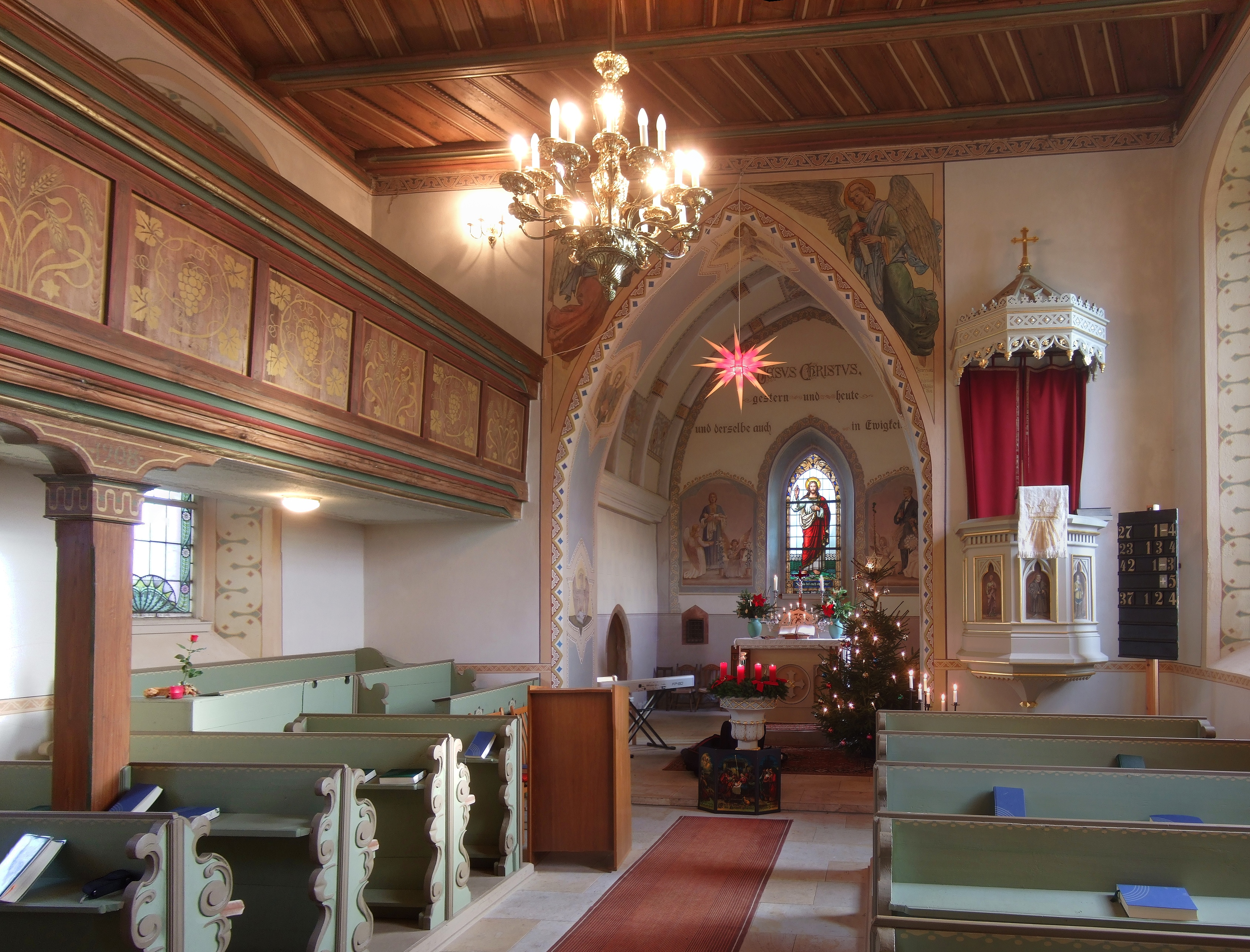 Das Bild zeigt die kleinste von drei Dorfkirchen in Langenbernsdorf - OT Niederalbertsdorf - in Sachsen.